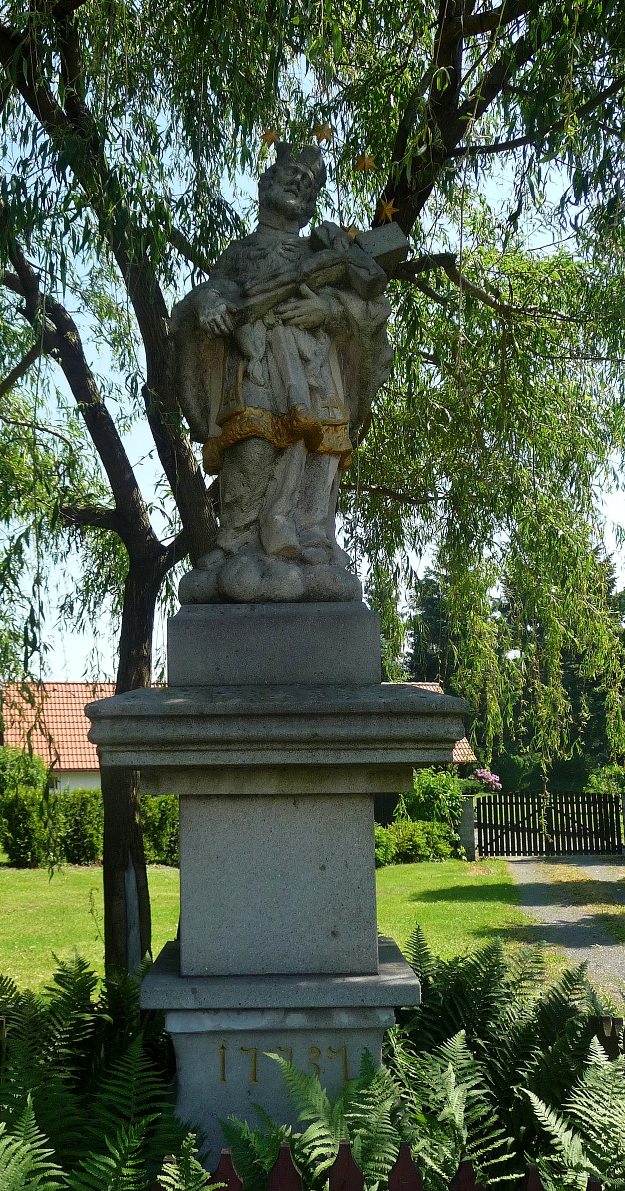 Socha sv. Jana Nepomuckého (Březová), v parčíku u kostela, Březová